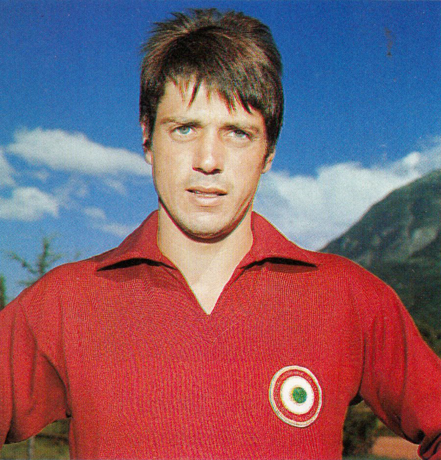 Il calciatore italiano Aldo Agroppi al nella stagione 1968-1969